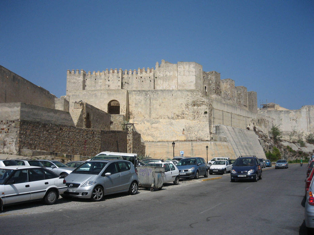 Castillo de Tarifa (Andalucía, España) / Castle of Tarifa (Andalusia, Spain)